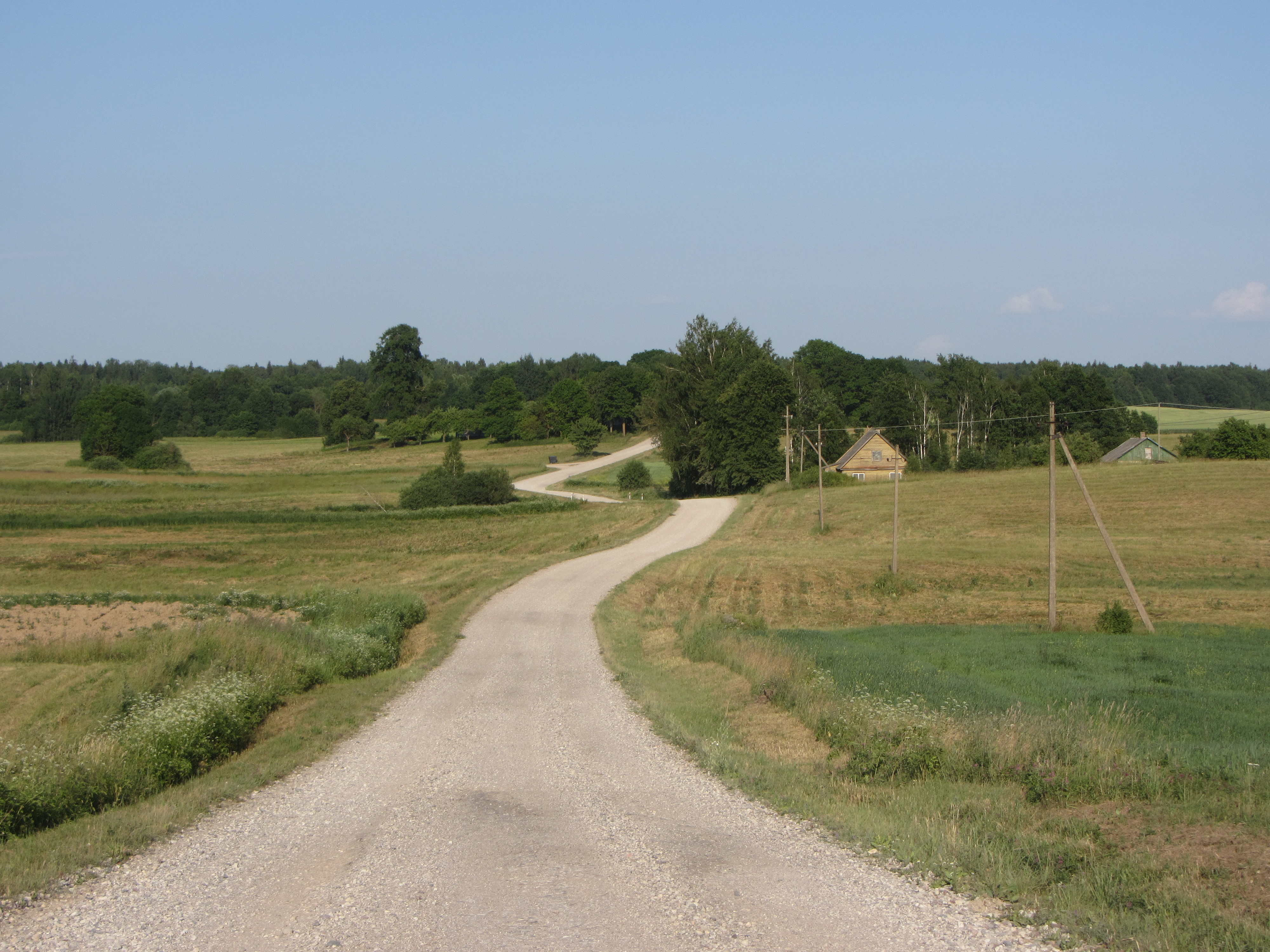 Skiemonių sen., Lithuania